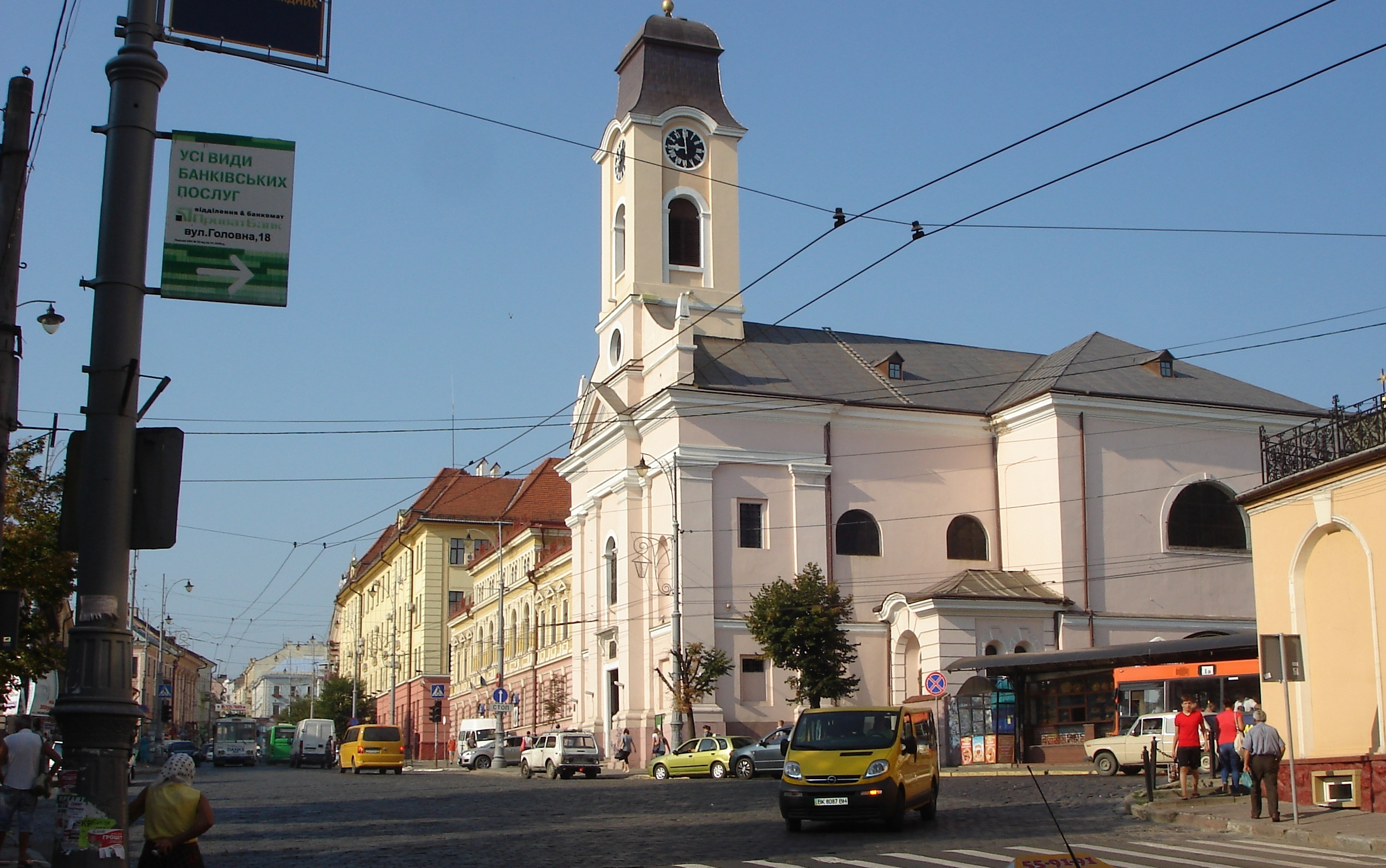 ракурс костелу Воздвиження Святого Хреста в Ченівцях